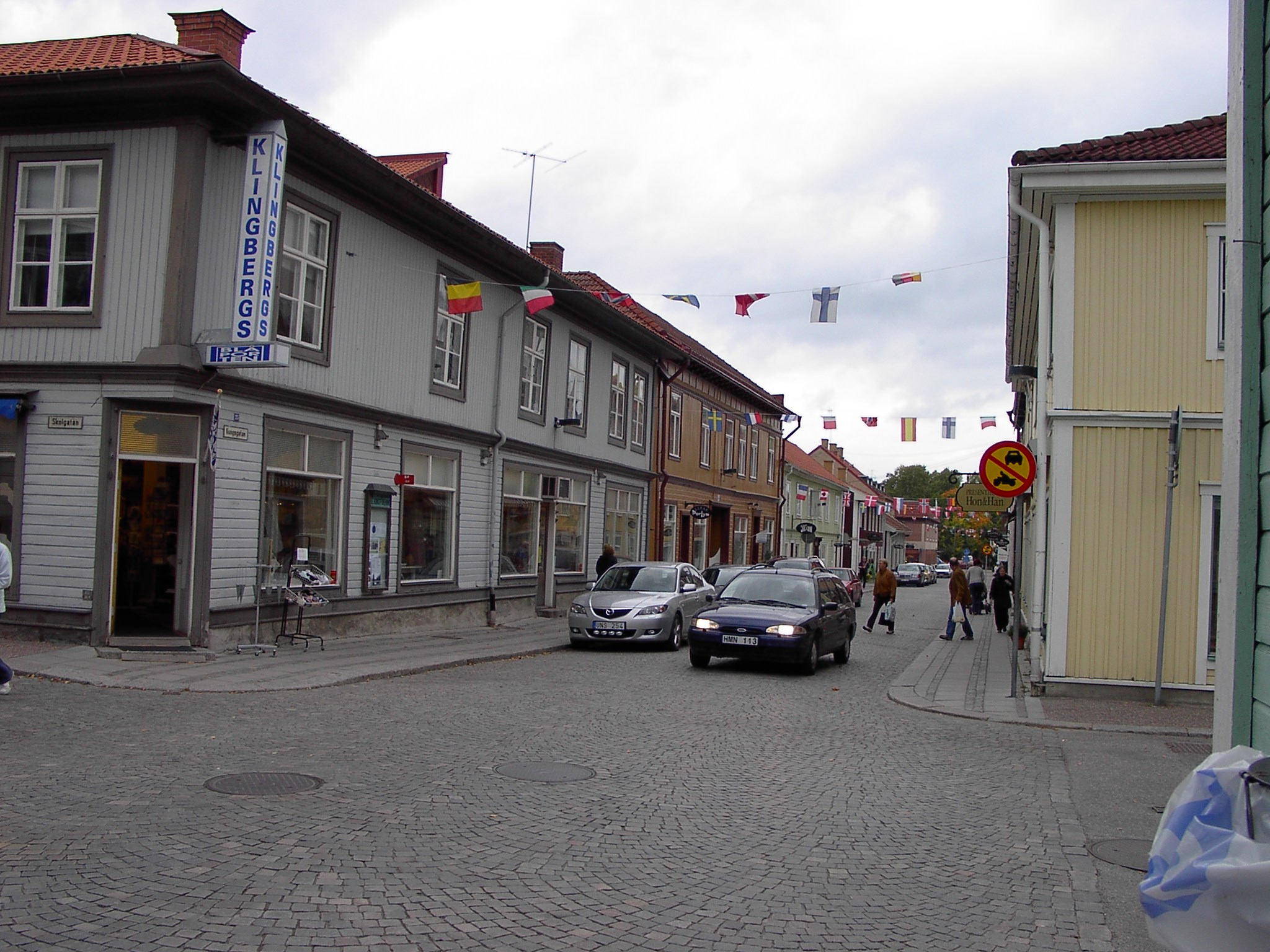 Lindesberg, Kungsgatan.